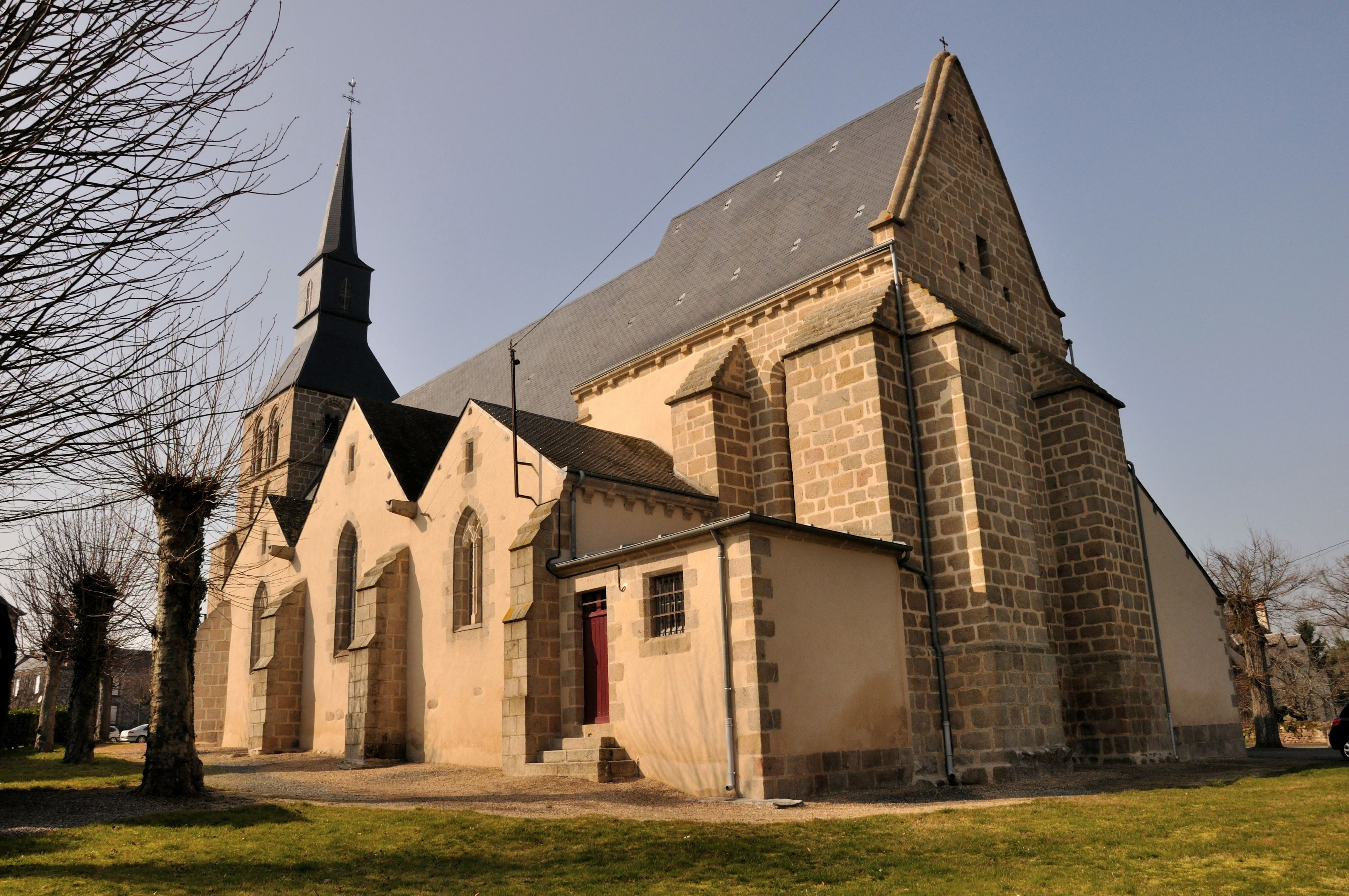 Crevant (Indre) - Eglise Saint-Aubin